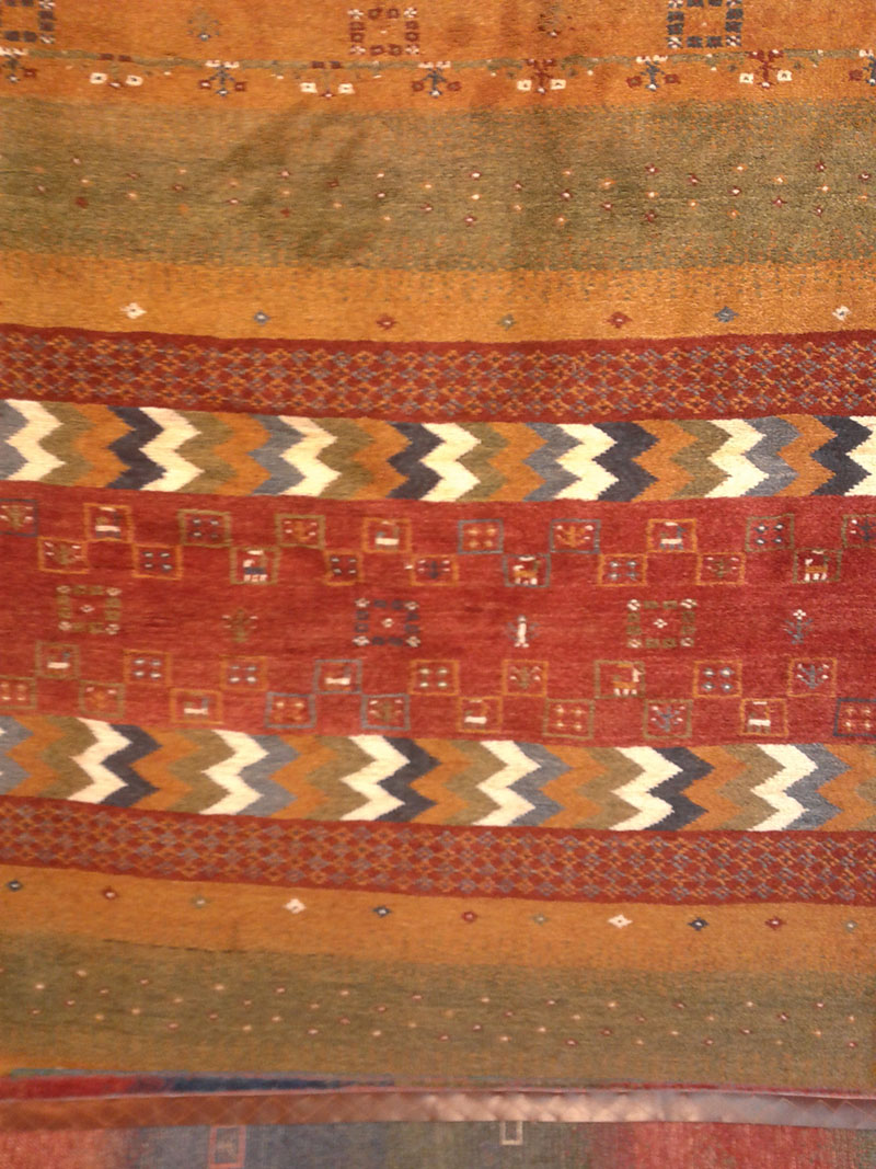 گبه اصیل ایرانی